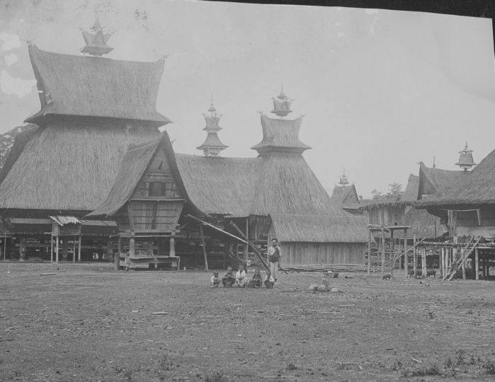 foto. Een Karo Batak dorp